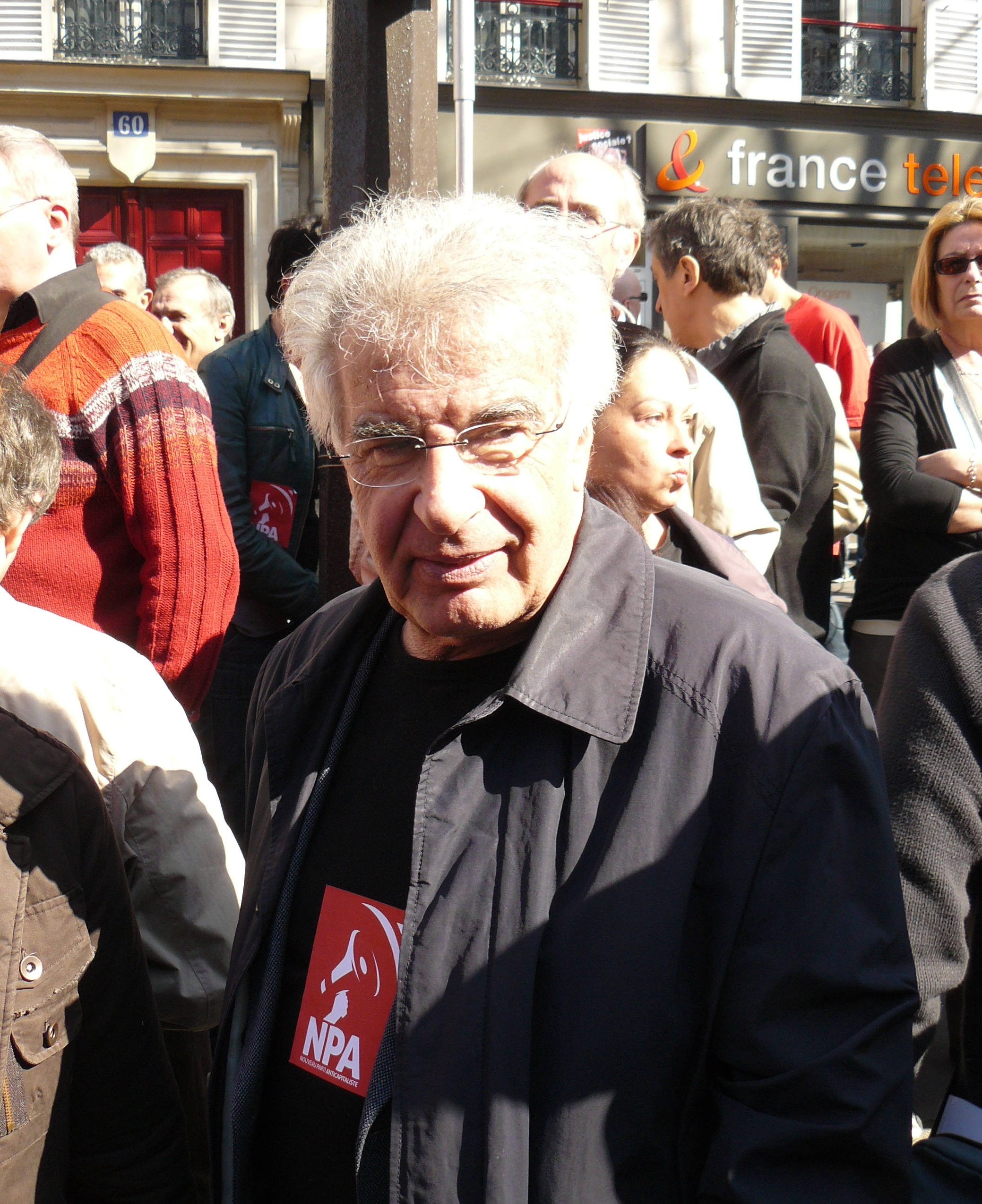 Alain Krivine, dirigeant de l'ancien parti "Ligue communiste révolutionaire" (LCR), refondu désormais dans le "Nouveau parti anticapitaliste" (NPA), lors de la manifestation du 19 mars 2009 à Paris.